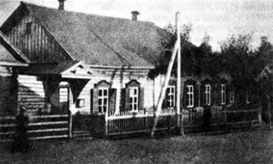 Беларуская (тарашкевіца): Круглае (Kruhłaje). Паштовая станцыя